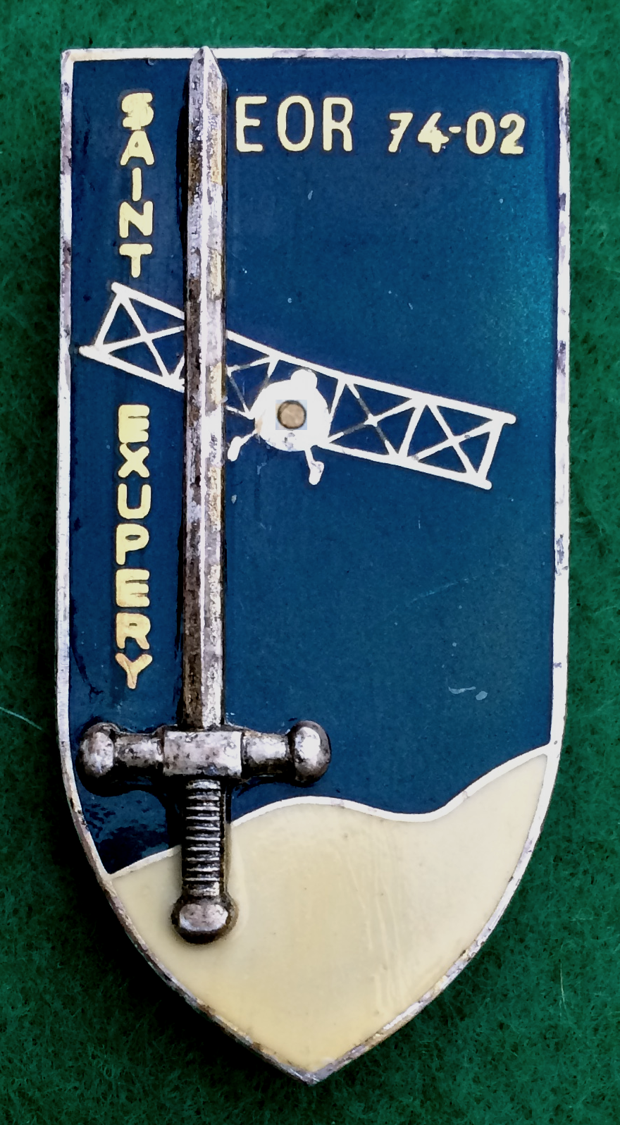 Insigne de la promotion EOR du 3e bataillon de l'ESM Saint-Cyr Coëtquidan de 1974 "Saint Exupery". L'auteur du "Petit prince" fut EOR (élève officier de réserve) en 1922. L'avion d'époque (un Breguet 14), sur fond de ciel bleu profond, au dessus des dunes du Sahara, rappelle qu'il fût breveté pilote militaire au Maroc en 1921, avant de commencer une carrière civile chez Latécoère (future Aéropostale) sur une ligne qui reliait le Sénégal. Entre-temps, promu sous-lieutenant, il fut aussi breveté observateur militaire d'aviation fin 1922. L'épée symbolise l'école d'officier (Drago - Paris).